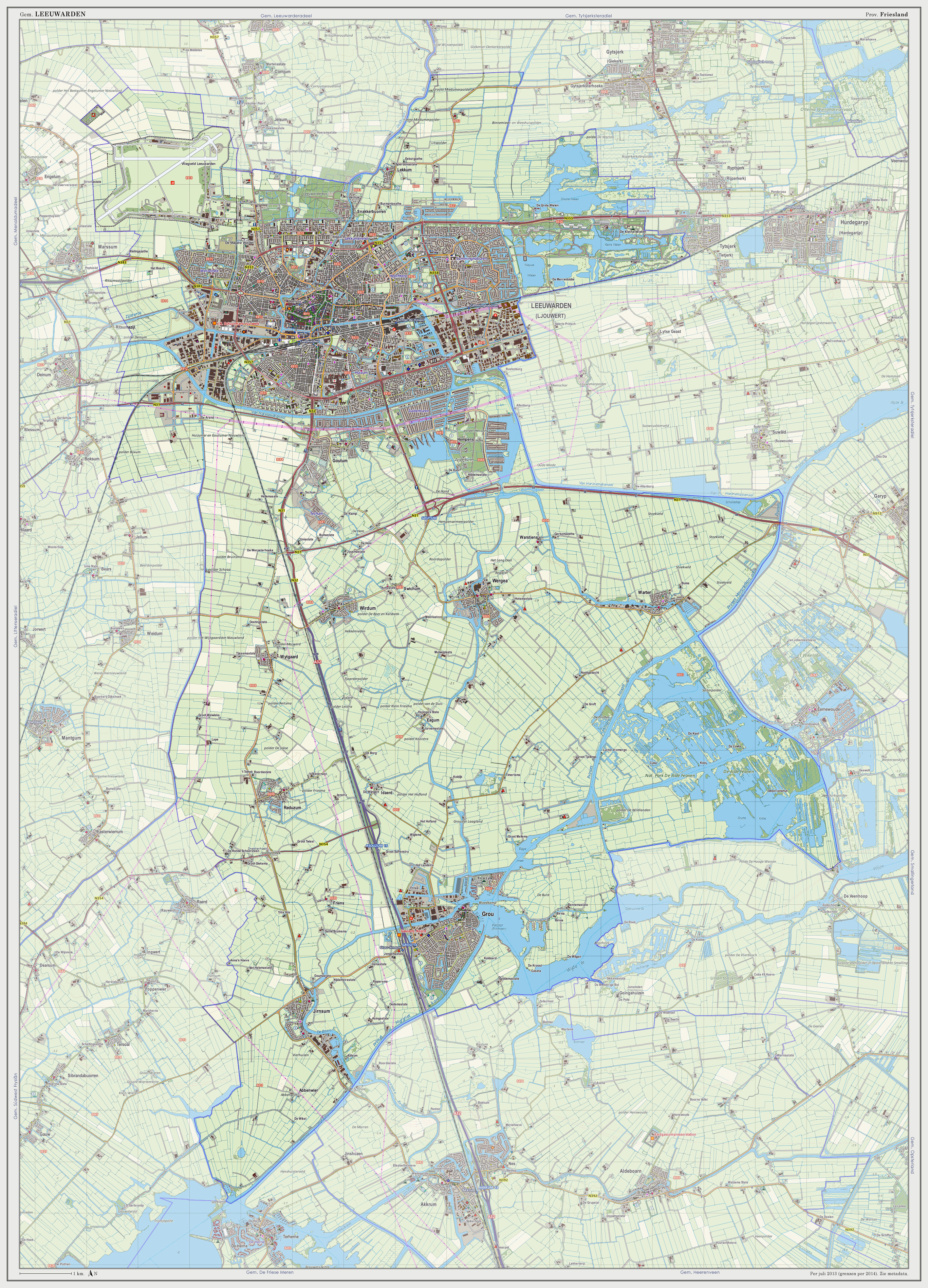 Topografische kaart van gemeente Leeuwarden (2013). Samengesteld door Jan-Willem van Aalst op basis van de GML open geodata van de BRT/Top10NL (basisregistratie Topografie, Kadaster 2011), vrijgegeven door Kadaster onder de Creative Commons BY licentie. Additionele gegevens uit BAG (8 juli 2013), uit de Open Street Map (9 juli 2013) en uit de Risicokaart. Peildatum kaartbeeld: 9 juli 2013. Zie ook Gemeentenatlas.nl Samenstelling en kleurenschema: Jan-Willem van Aalst, met QuantumGIS en Photoshop. Zie ook de Legenda.